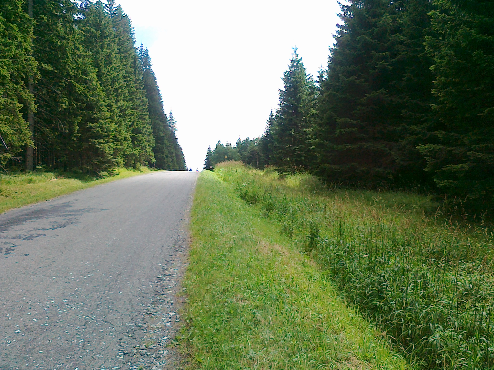 Widok na przełęcz Sedlo nad Karlovou Studánkou (Kóta)